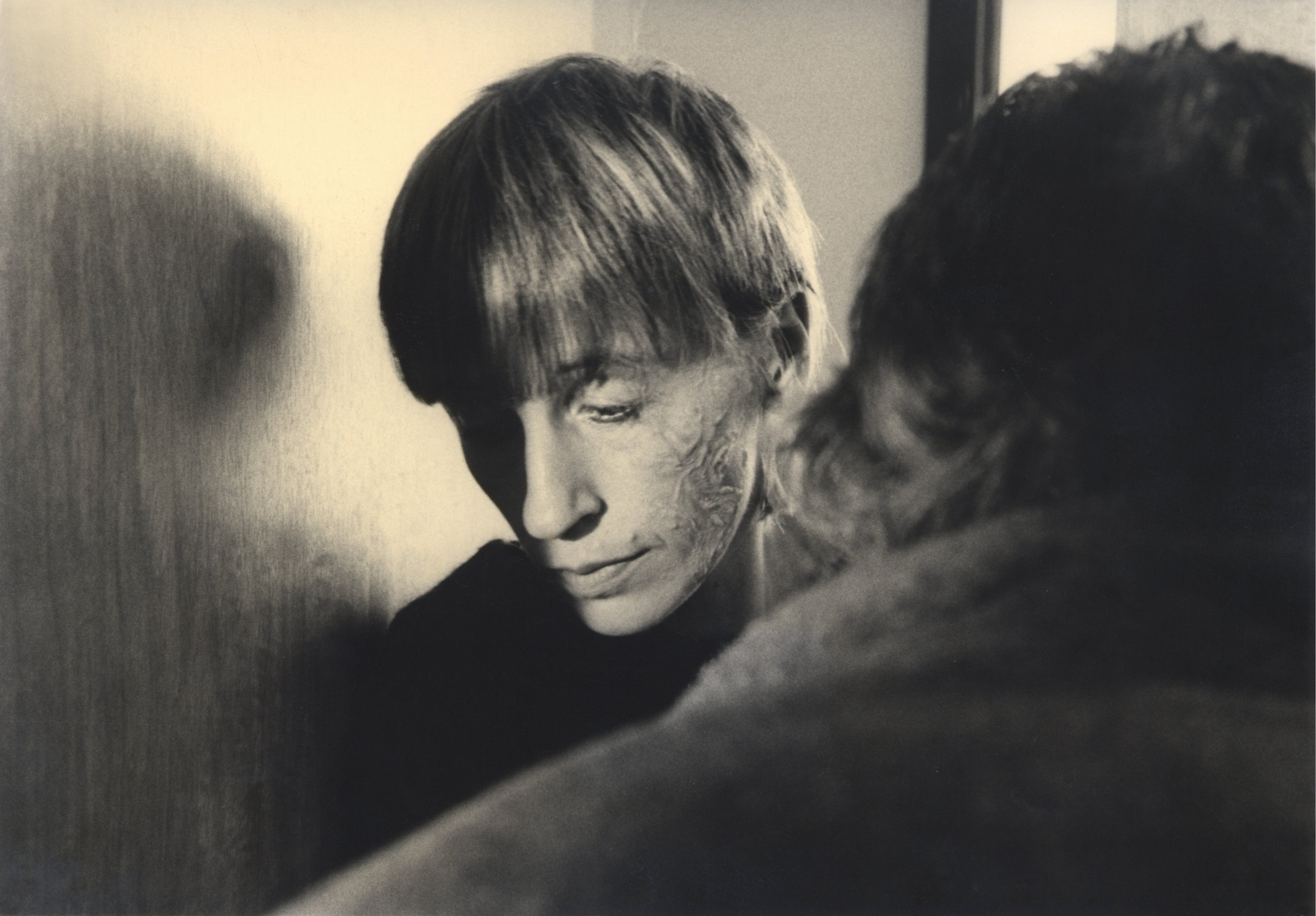 Ingrid Puganigg als Martha Dubronski in dem gleichnamigen Film (1984) nach ihrem Roman "Fasnacht". Scan eines Fotos aus dem Besitz der Darstellerin / Autorin.